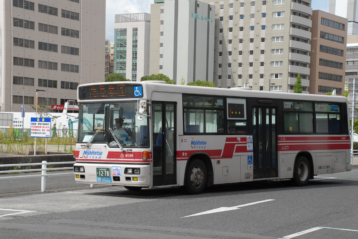 佐賀駅バスセンターにて撮影